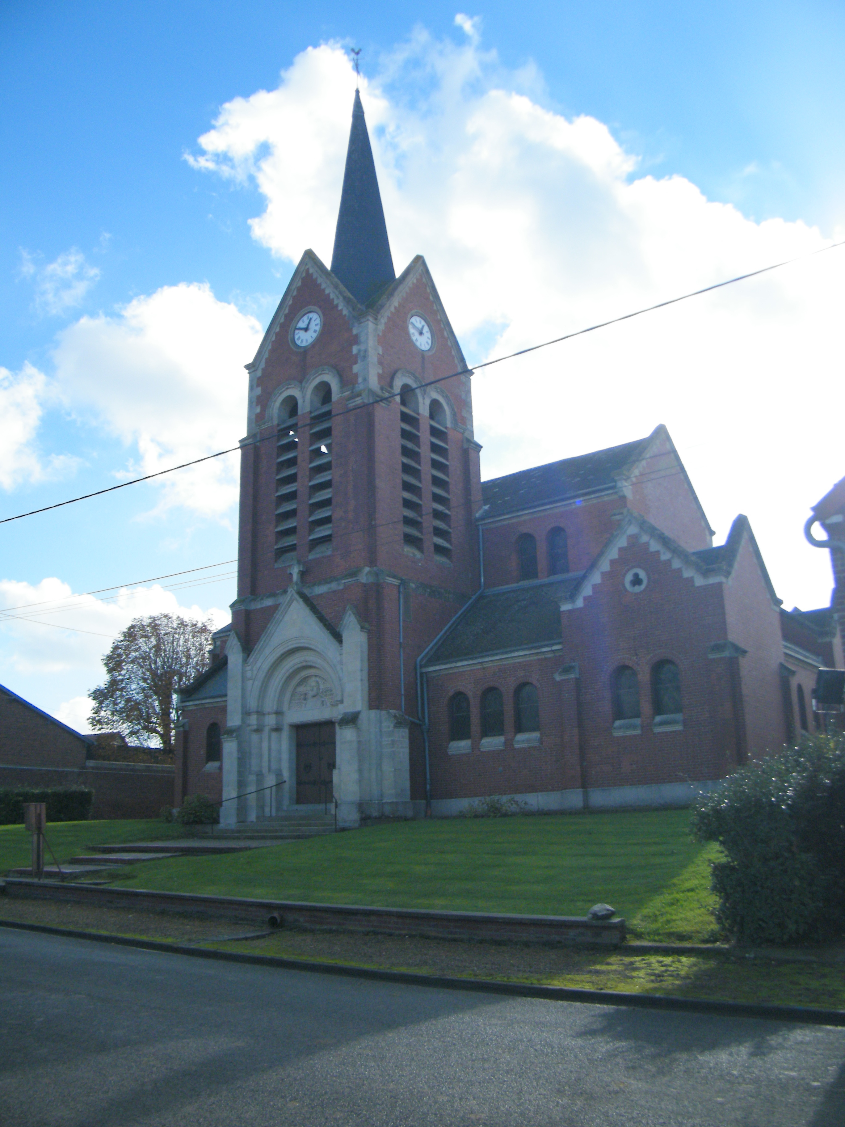 L'église.